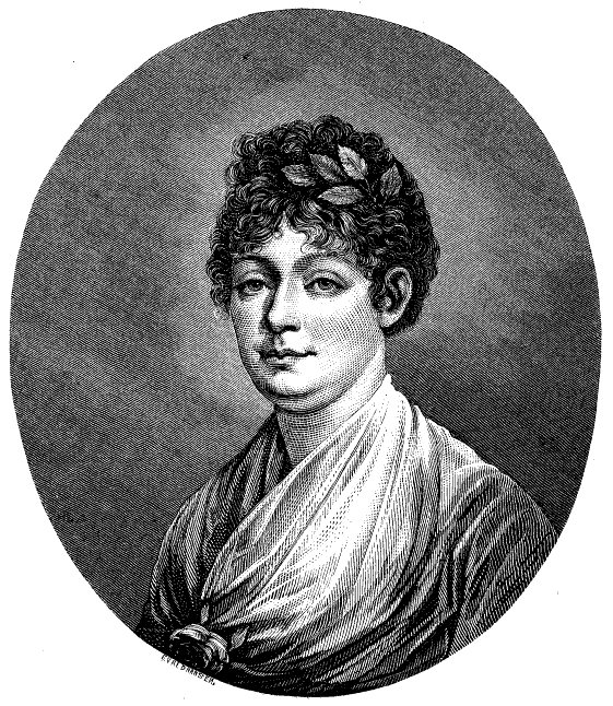 Anna Maria Lenngren; PD; Quelle: Svenska Familj-Journalen 1865